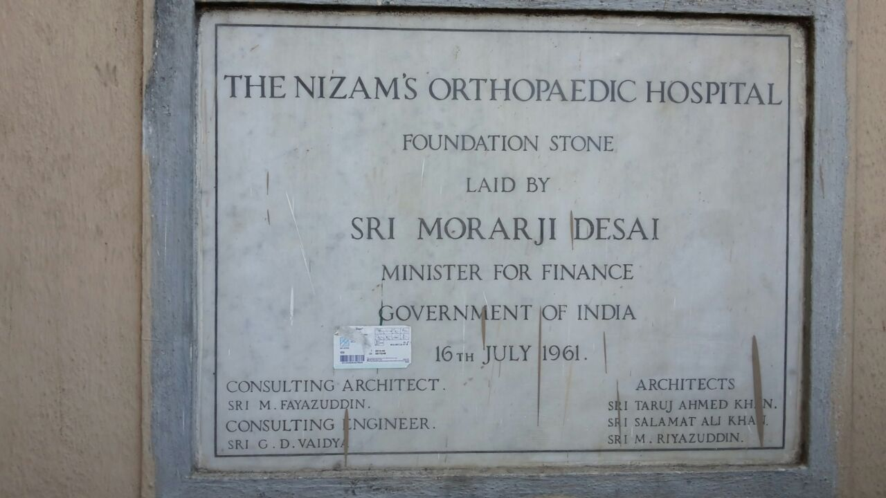 Foundation stone in the main building